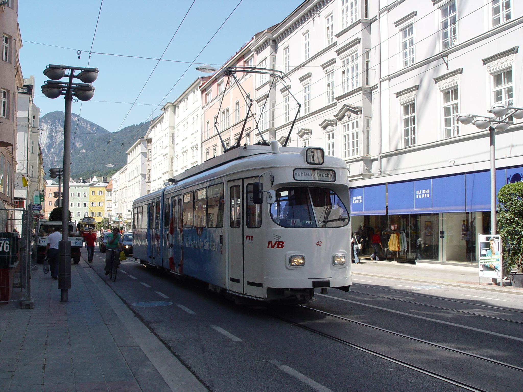 Triebwagen 42 und Triebwagen 75 (im Hintergrund) der Innsbrucker Verkehrsbetriebe in der Museumstraße